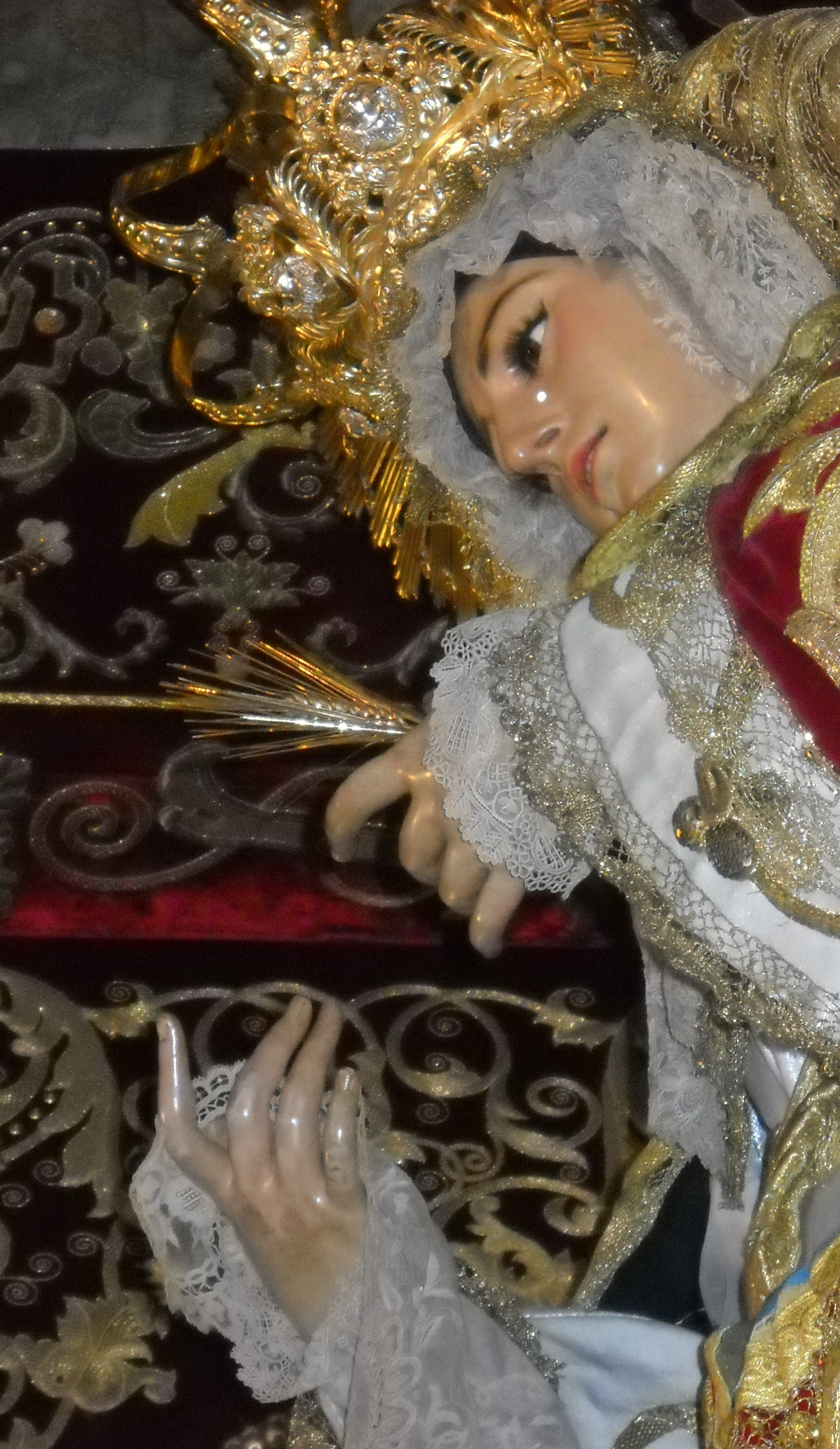 Virgen de Regla